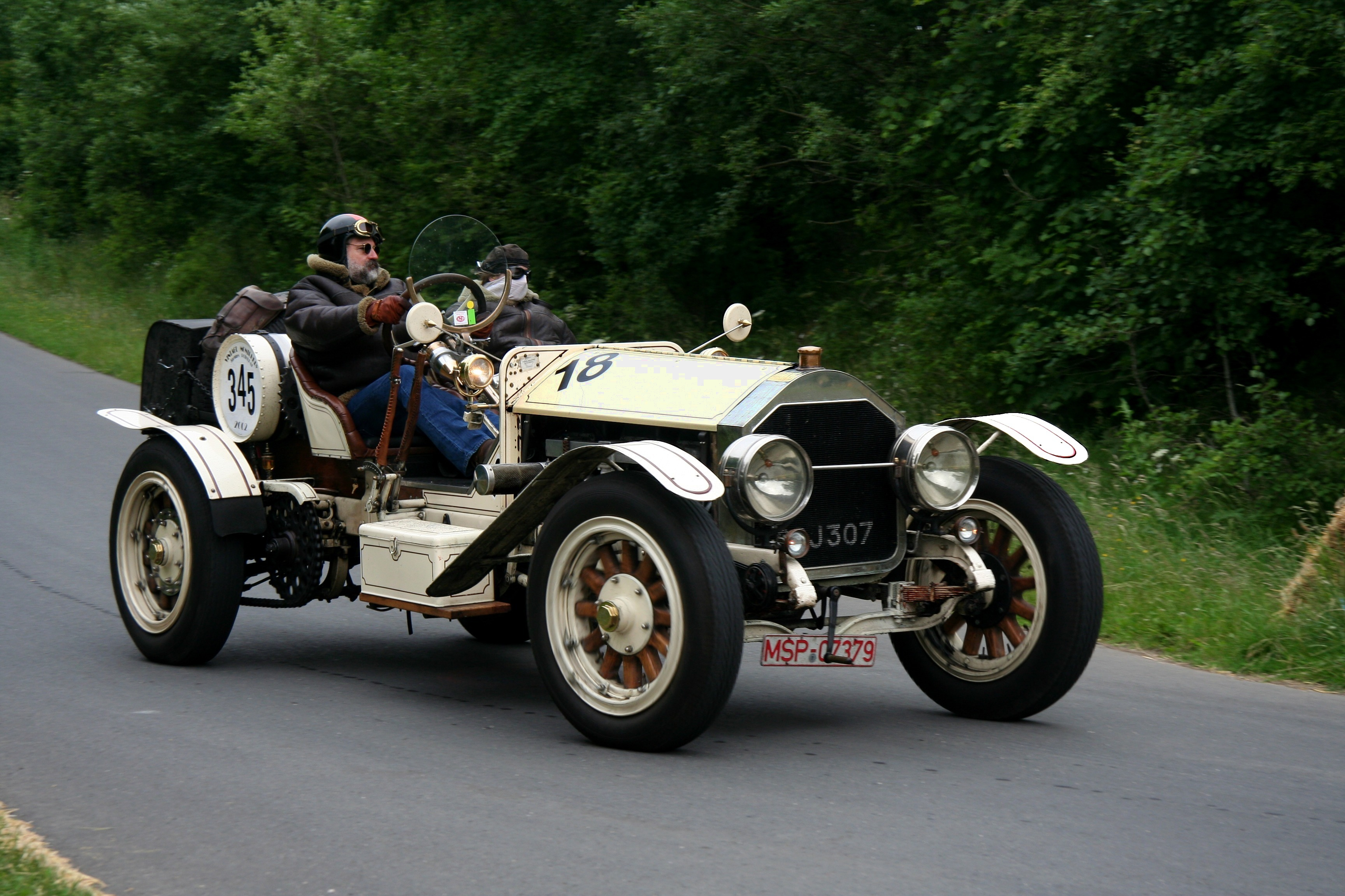 American LaFrance beim Oldtimer-Festival auf dem Nürburgring, Südschleife